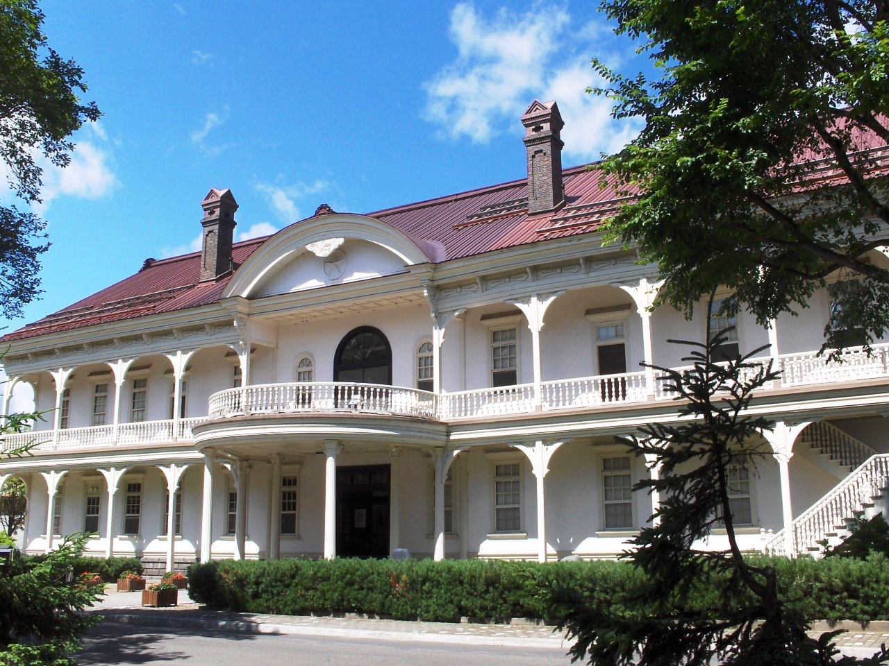 旧旭川偕行社（現中原悌二郎記念旭川市彫刻美術館）外観。2006年、投稿者撮影。 Category:旭川市の画像 Category:重要文化財の画像